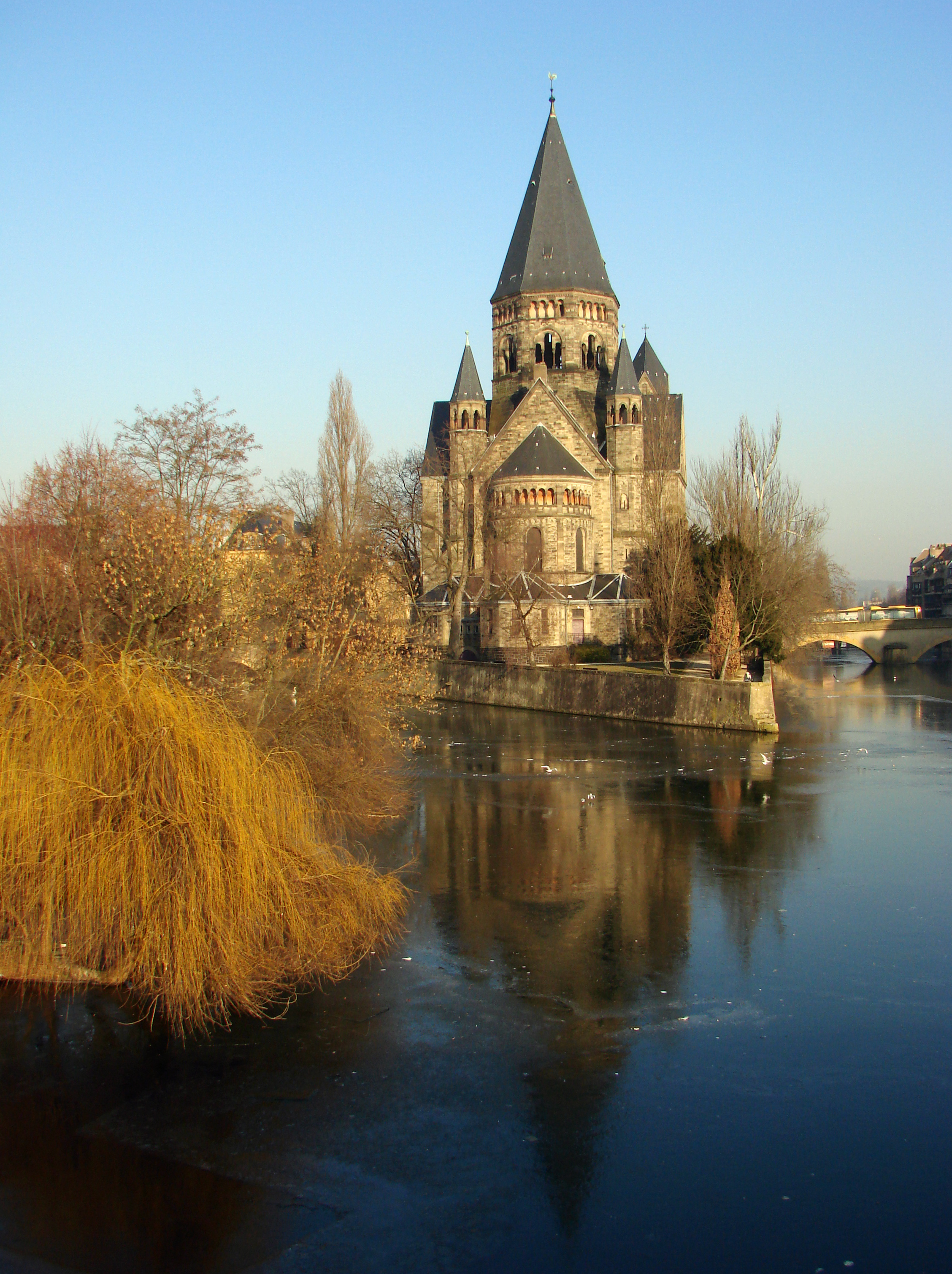 Le Temple Neuf à Metz, depuis le Pont Moyen, en hiver, avec les bras de la Moselle partiellement gelés.